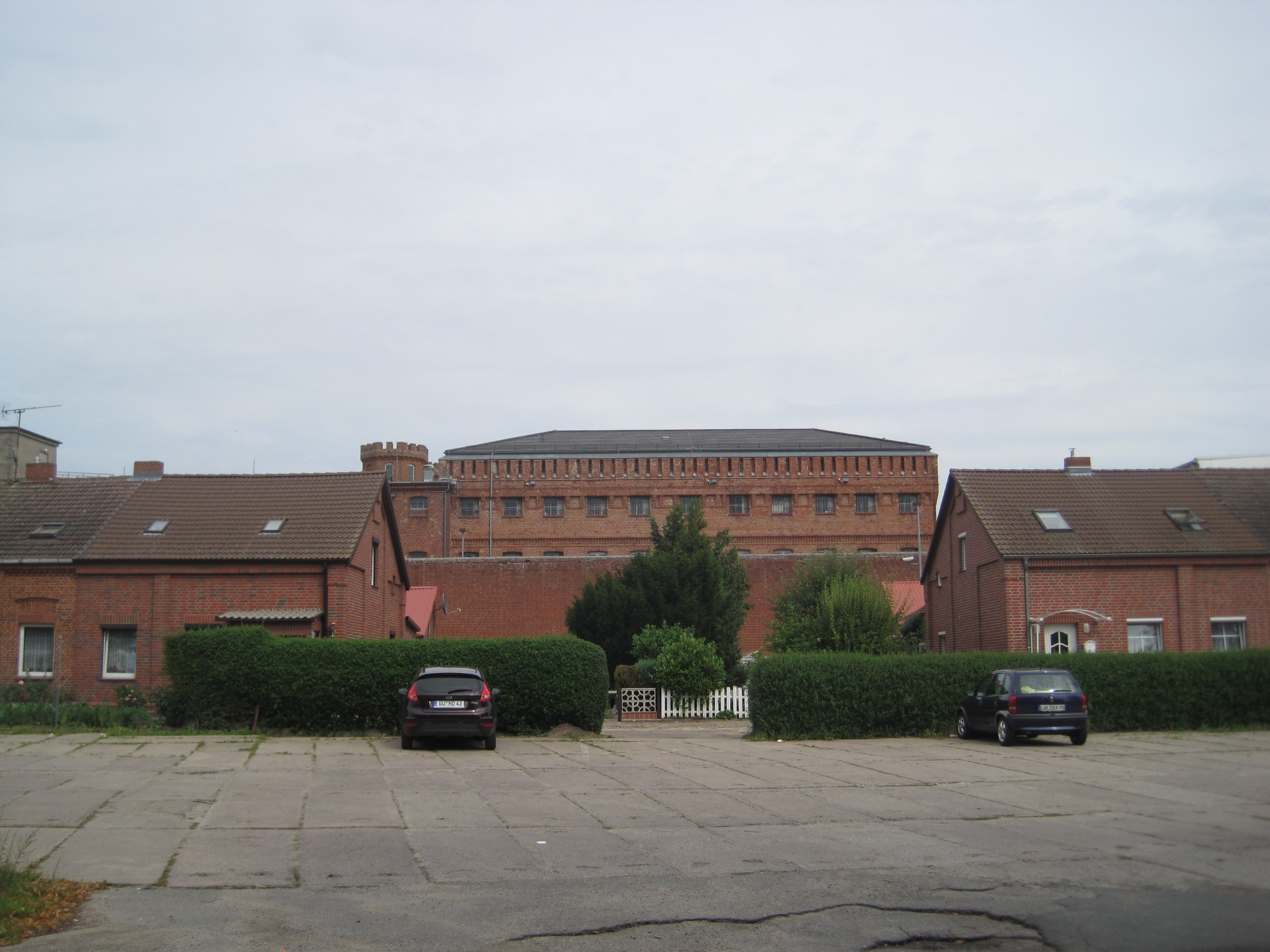 JVA Bützow